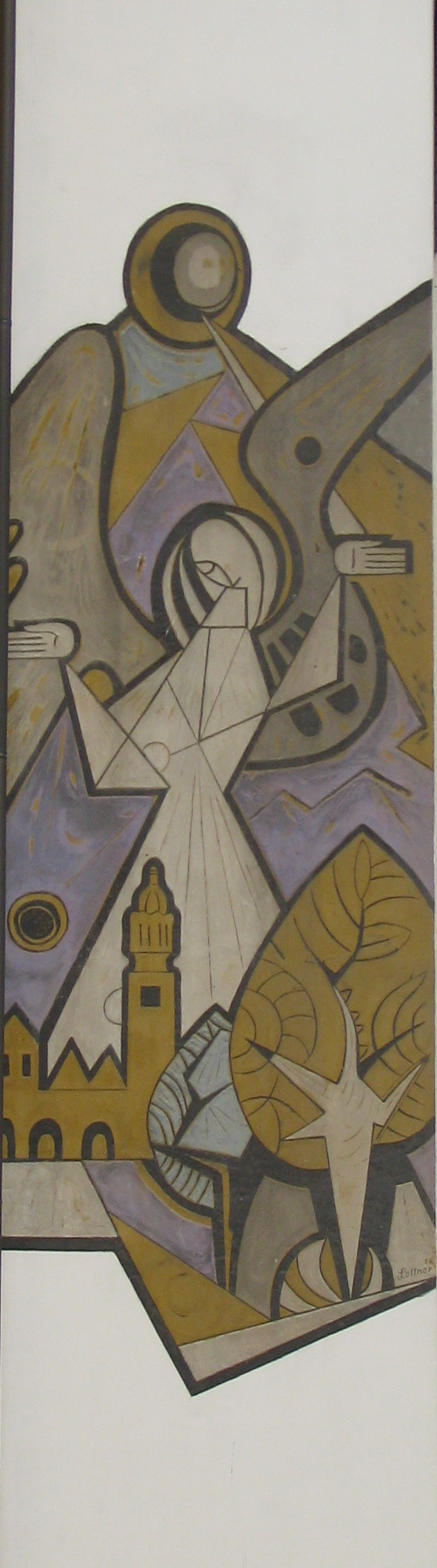 Innsbruck, Hormayrstr. 17: Sgraffito Schutzengel von Franz Lettner, 1958 This media shows the remarkable cultural object in the Austrian state of Tyrol listed by the Tyrolean Art Cadastre with the ID 68298. (on tirisMaps, pdf, more images on Commons, Wikidata)